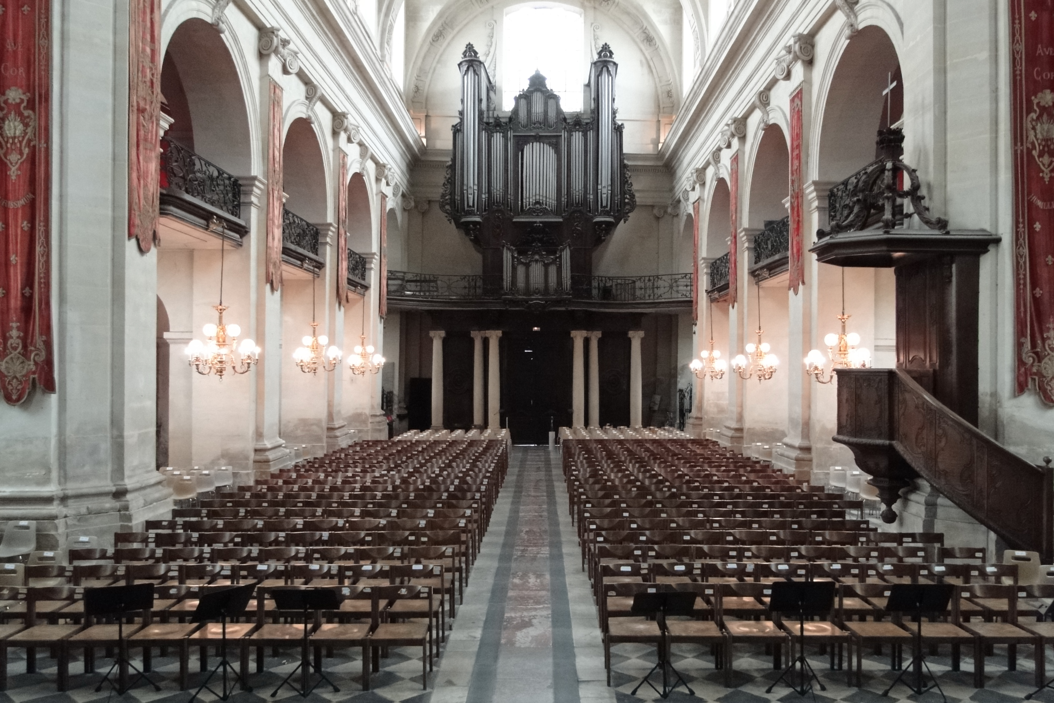 Notre Dame de la Gloriette à Caen (Calvados); Buffet à deux corps du XVIIIe siècle, classé Monument Historique au titre objet depuis le 13-05-1976; modifié pour abriter l'orgue de Verschneider et Baker de 1859 plusieurs fois remanié par Charles Mutin, Cavaillé-Coll, Victor Gonzalez en 1932 et enfin Roethinger en 1959.